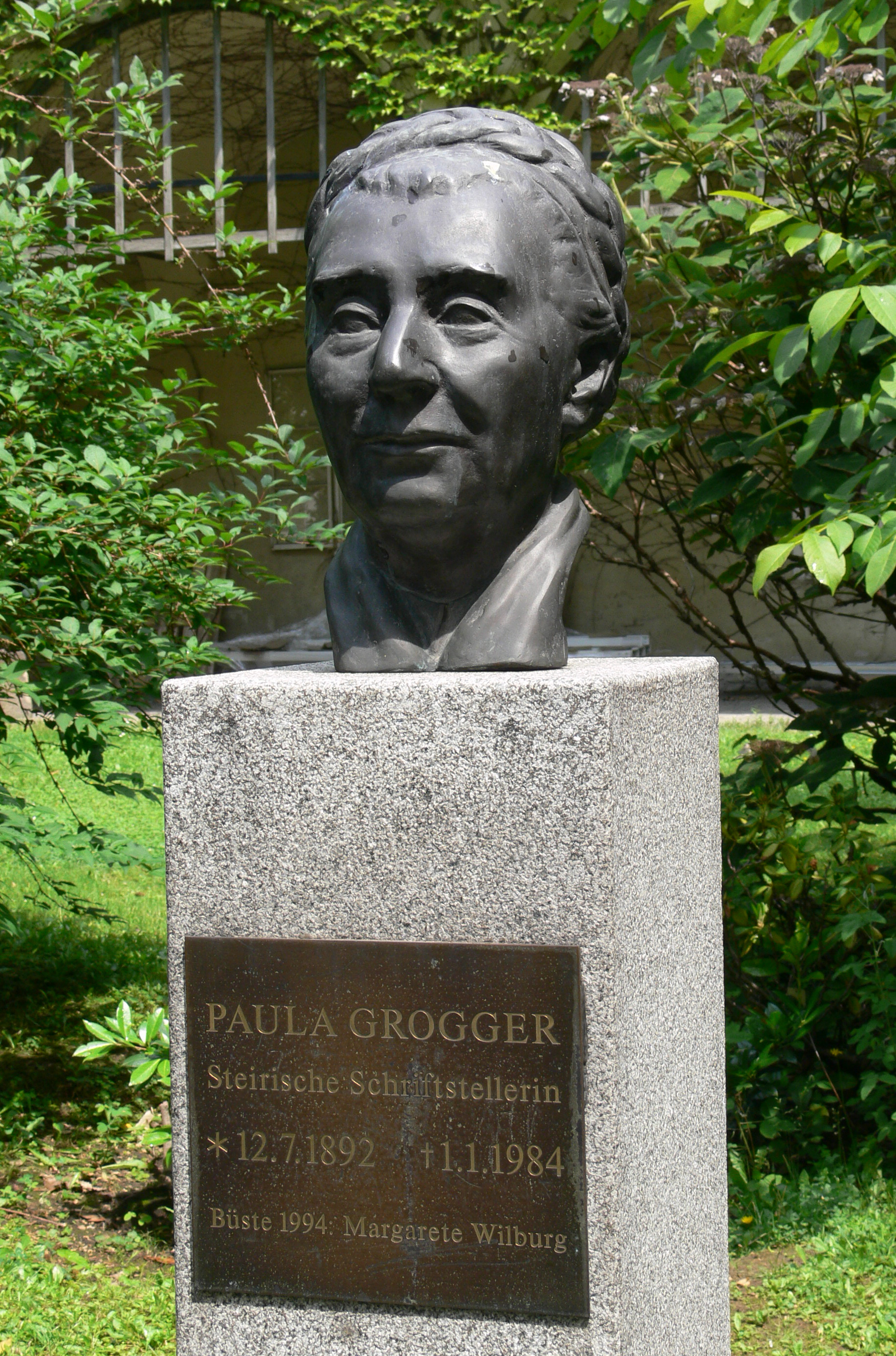 Ehrengalerie in einem Hof der Grazer Burg Büste „Paula Grogger“ von Margarete Wilburg, 1994